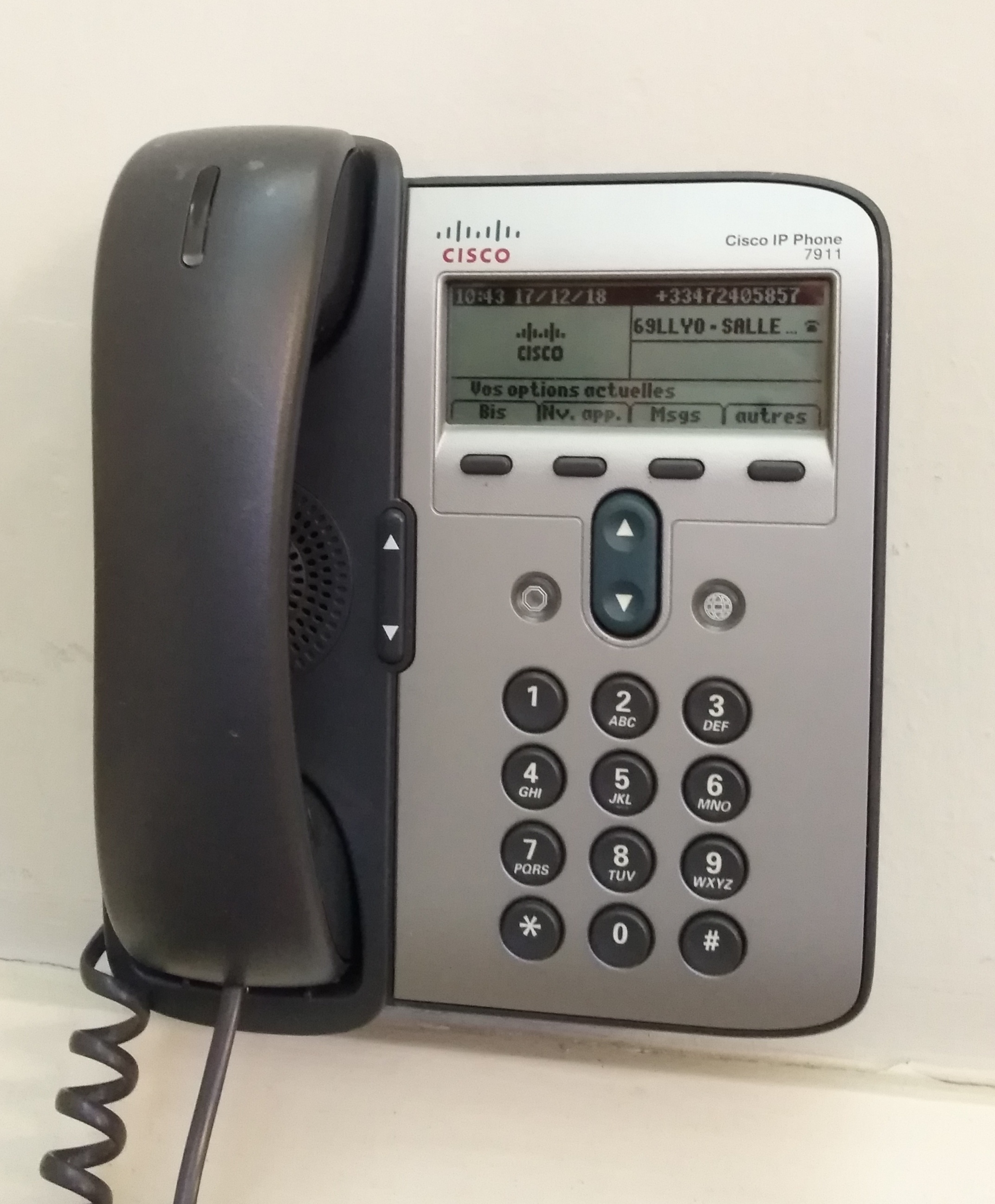 Téléphone fixe Cisco IP Phone 7911 au Palais de la Bourse de Lyon (2e arrondissement).